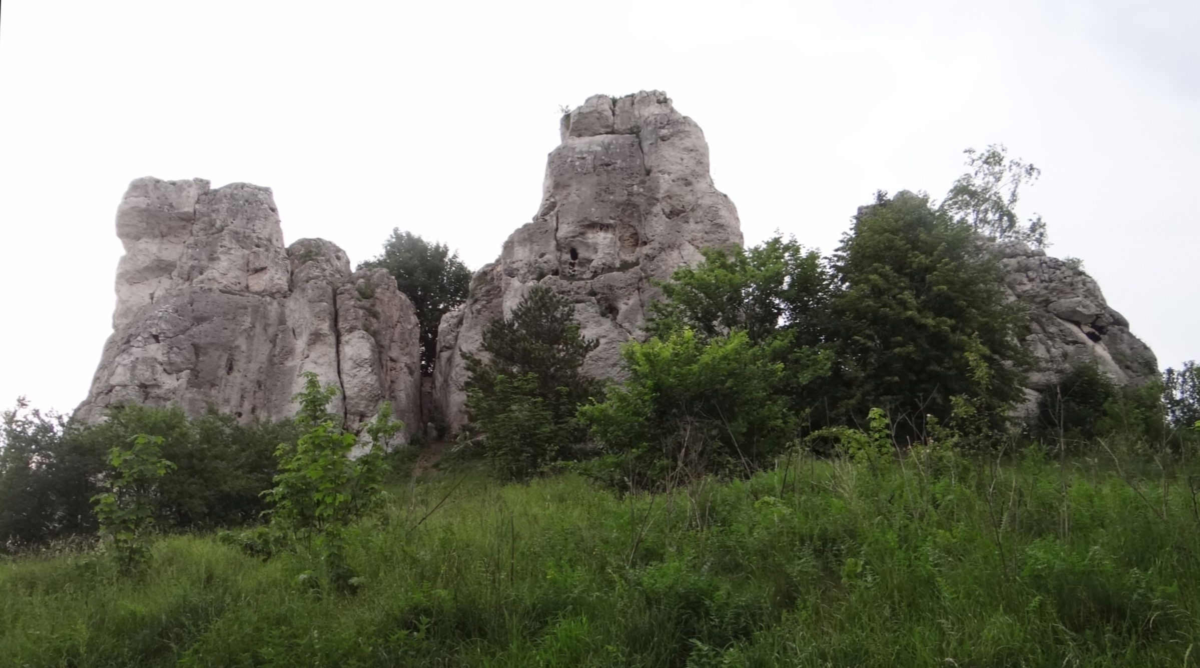 Skały Grupy Knura w Łutowcu